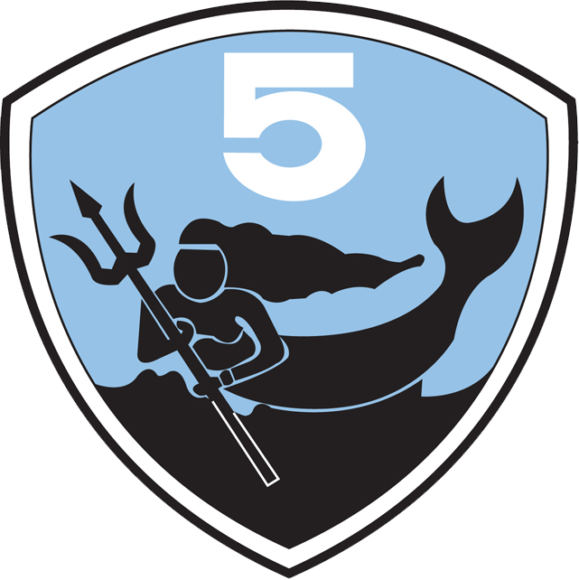 Gambar ini adalah Lambang Skuadron Udara 5, Koops AU II